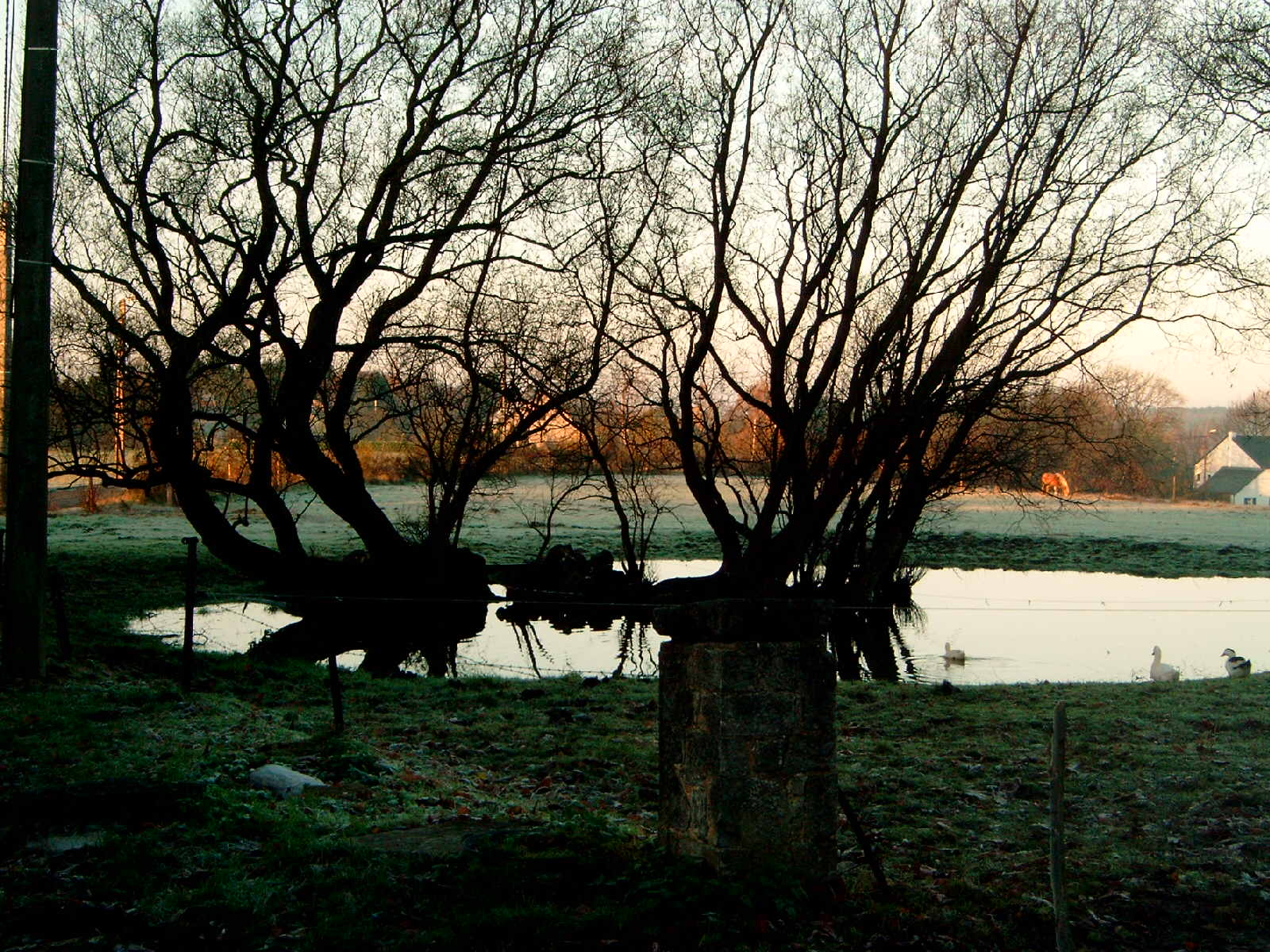 Reumont, gehucht van Malonne. Eigen opname.